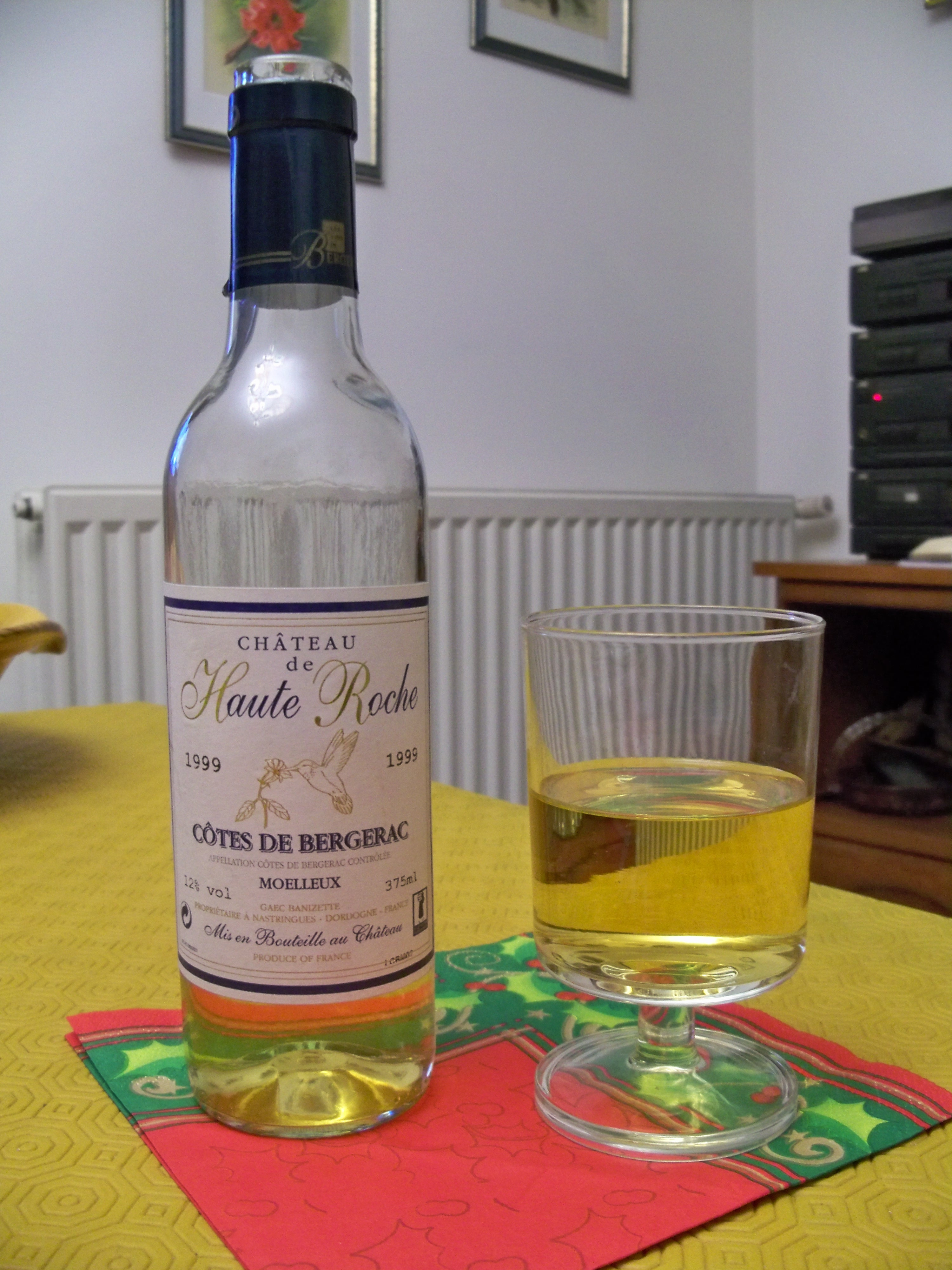 bouteille de Chateau de Haute Roche, cote de Bergerac